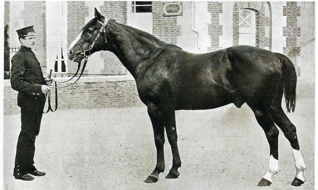 Phaéton, étalon trotteur français, né en 1871.